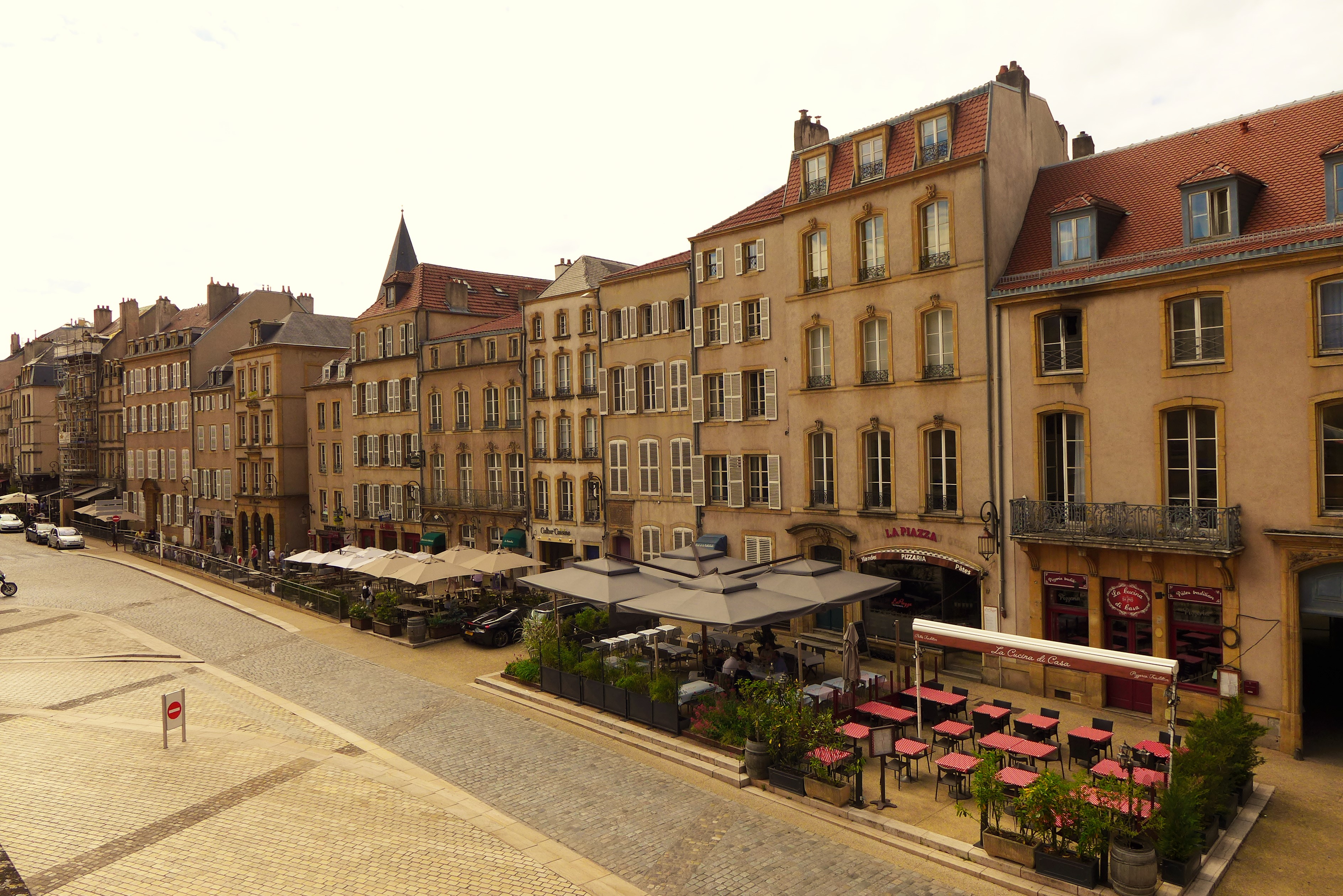 Metz, Place de Chambre/Kammerplatz